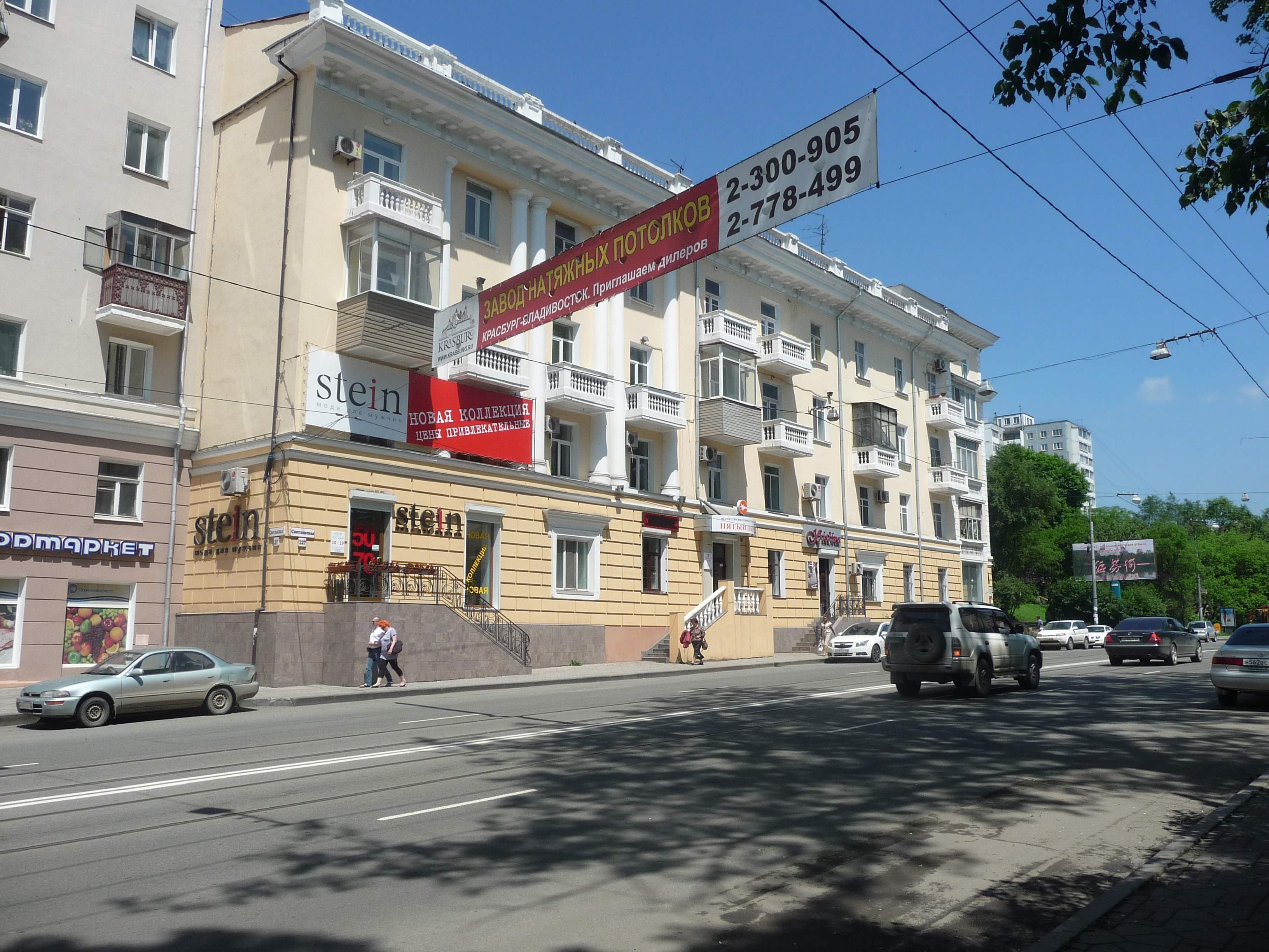 Владивосток, ул. Светланская, 127